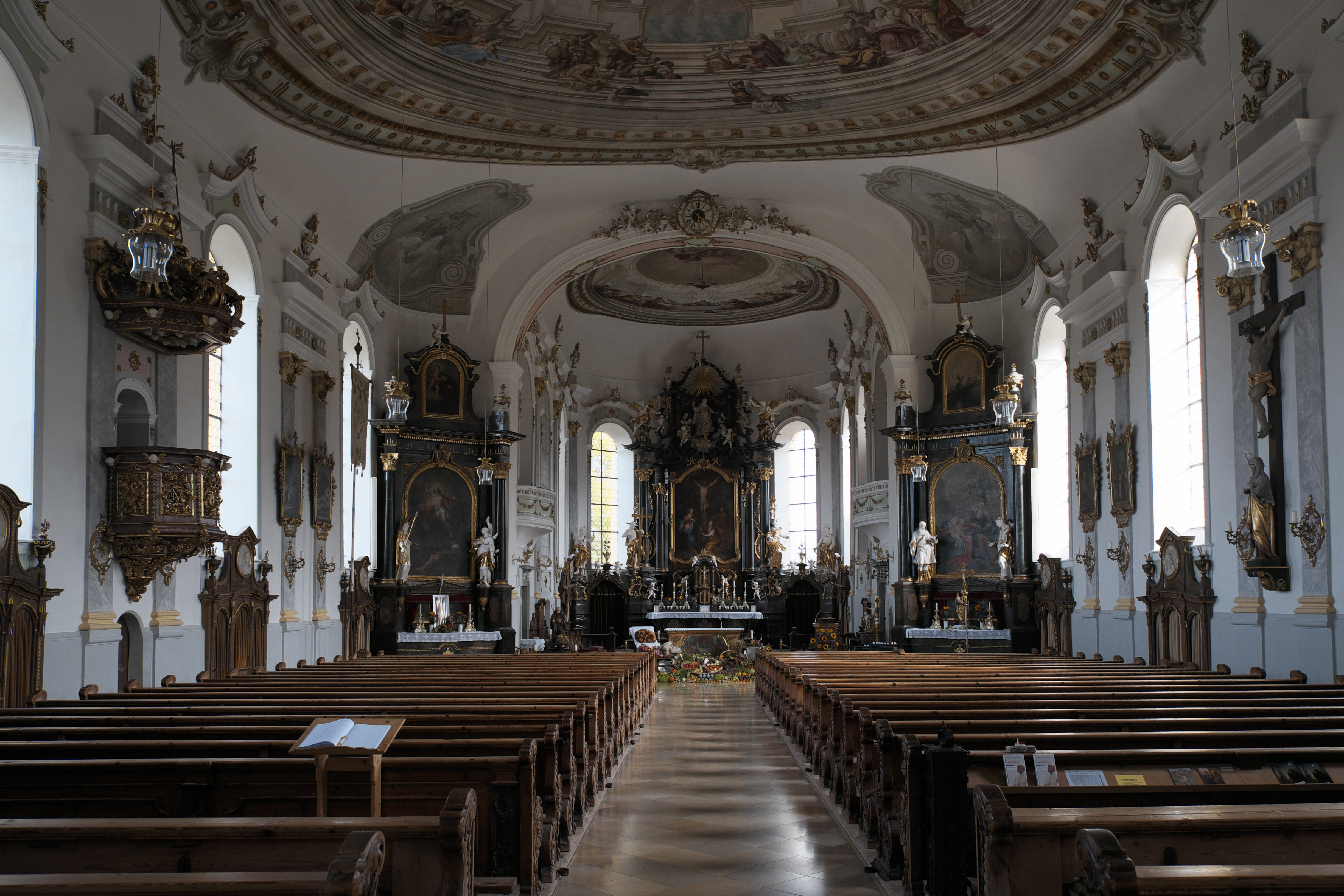 Katholische Pfarrkirche St. Nikolaus in Pfronten im schwäbischen Landkreis Ostallgäu (Bayern/Deutschland), Innenraum